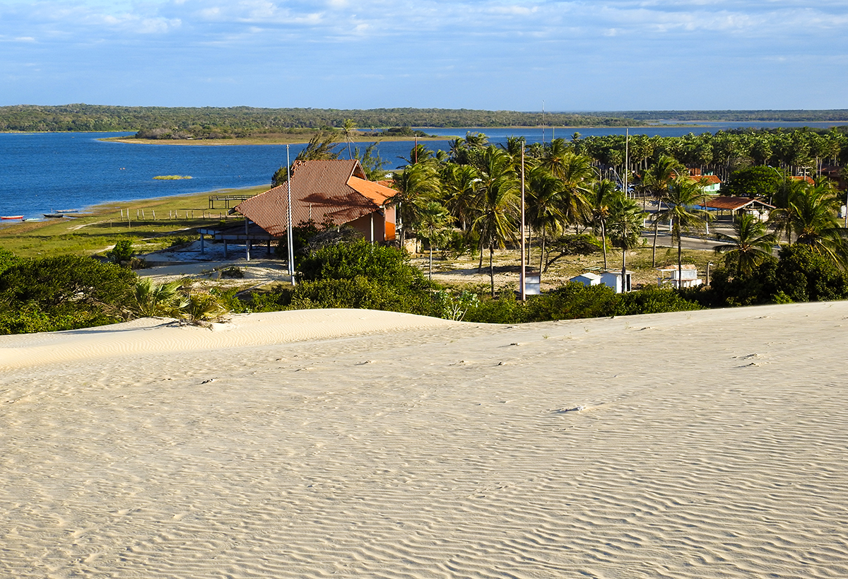 Vista da Lagoa do Portinho é um ponto turístico da cidade de Parnaíba.